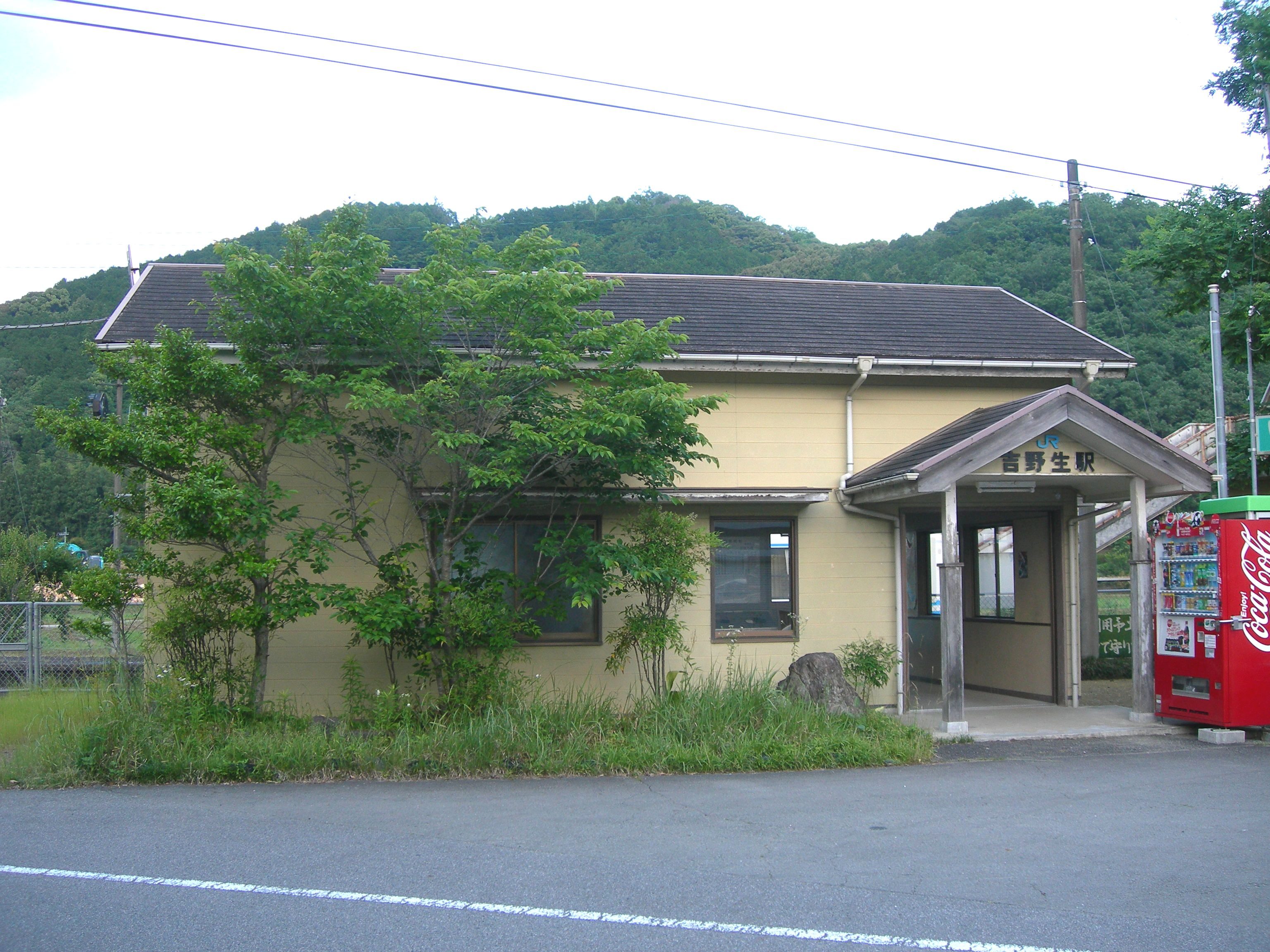 予土線 吉野生駅